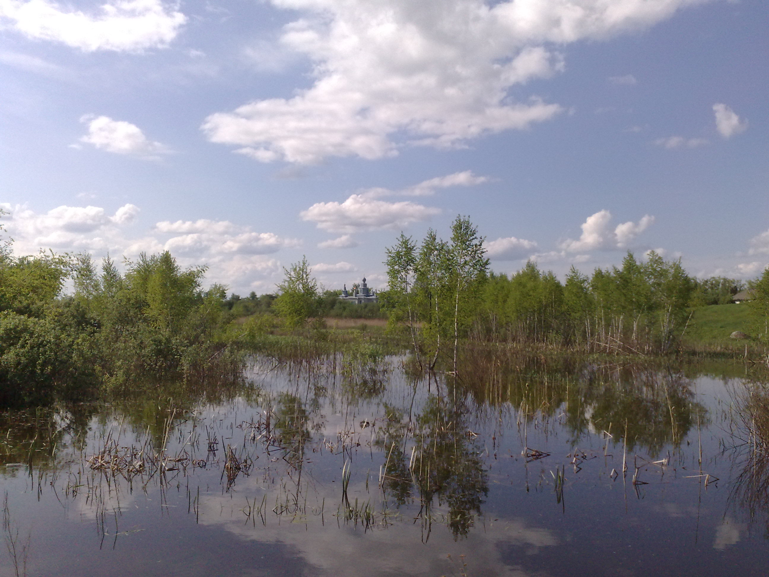 Верхів'я водосховища